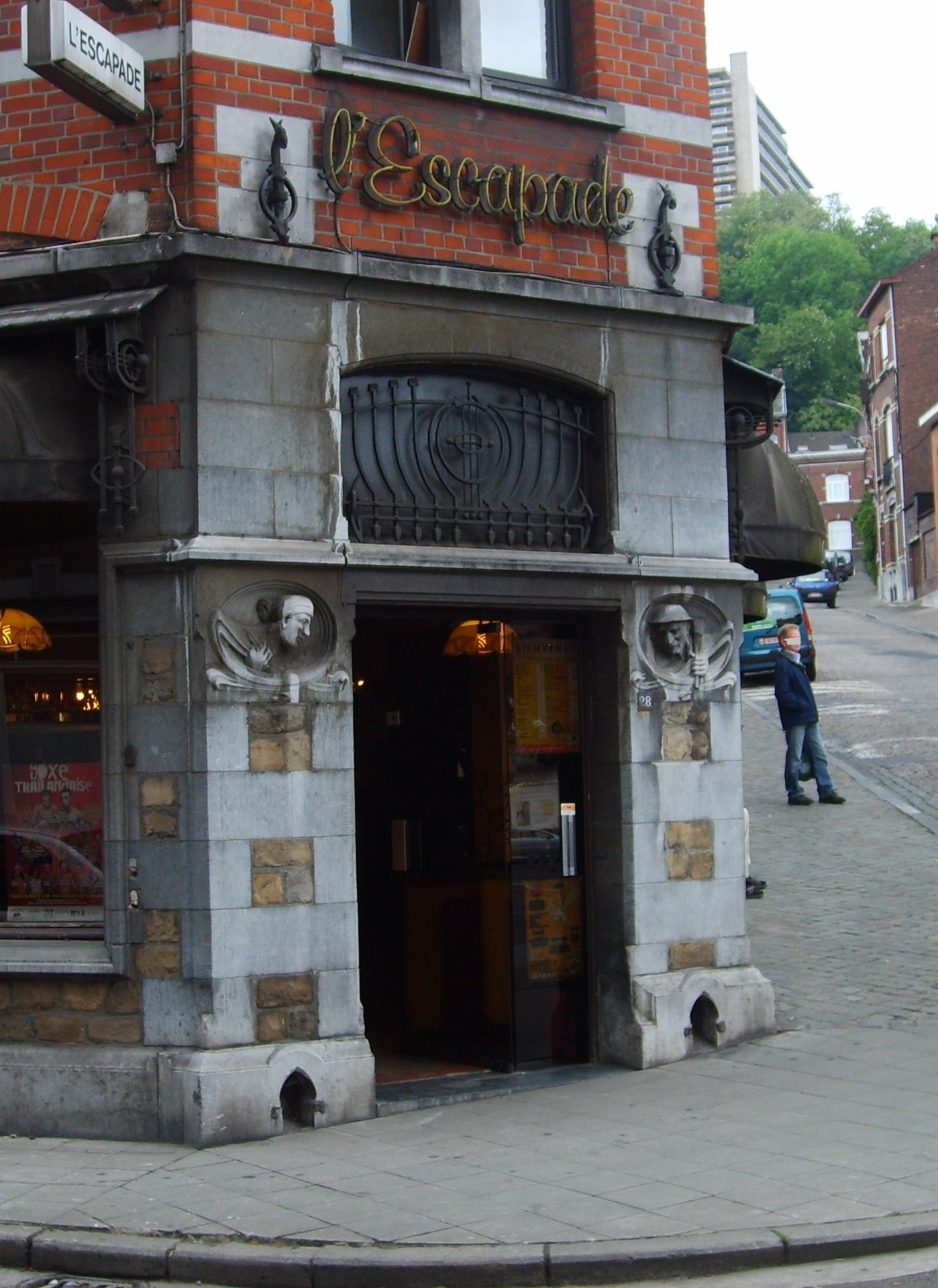 Maison Moonen Liège rue du Laveu, 28 Art nouveau arch. Victor Rogister, 1903